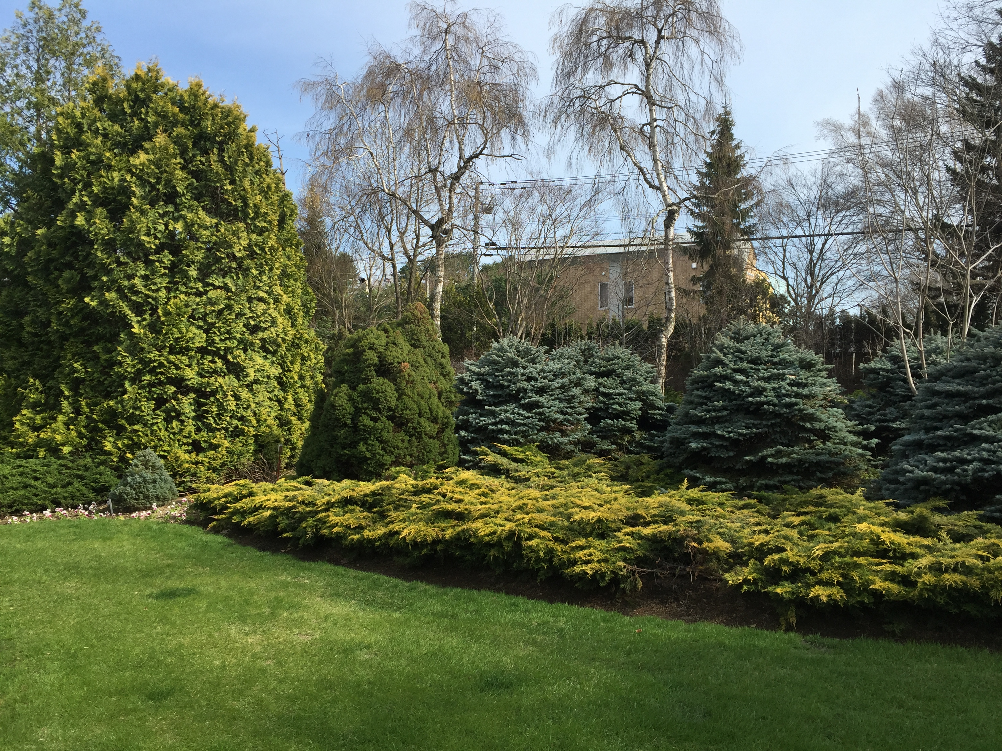 帯広市 真鍋農園